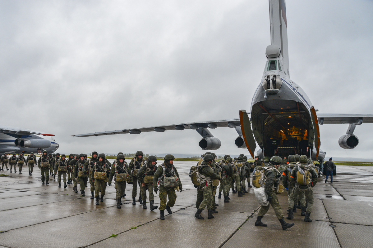 На полигоне «Цугол» применен оперативно-тактический десант в составе подразделений десантно-штурмового соединения ВДВ